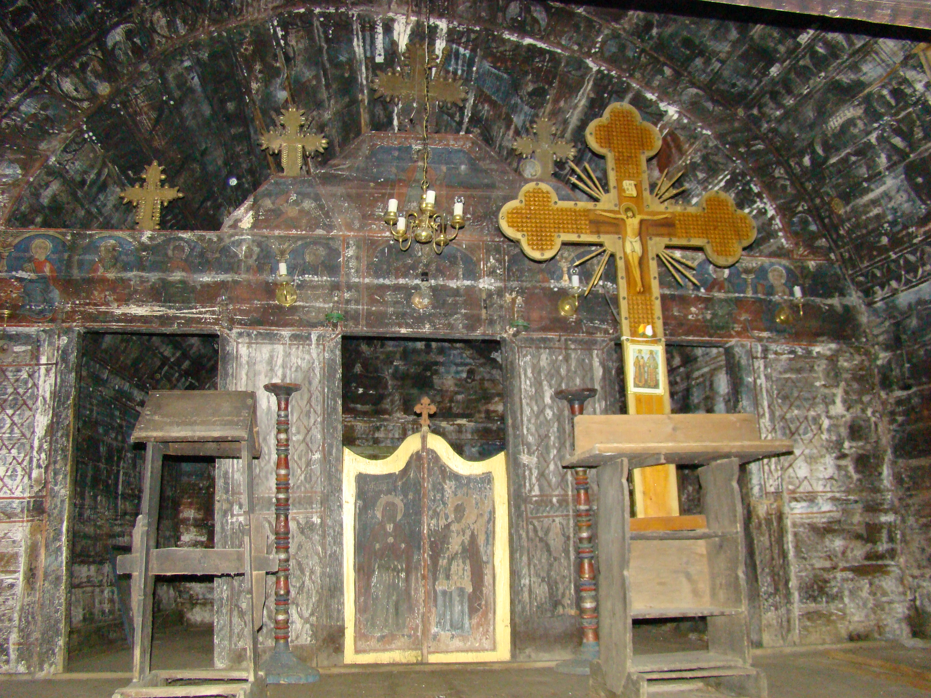 Biserica de lemn "Sf. Gheorghe" din Şpălnaca